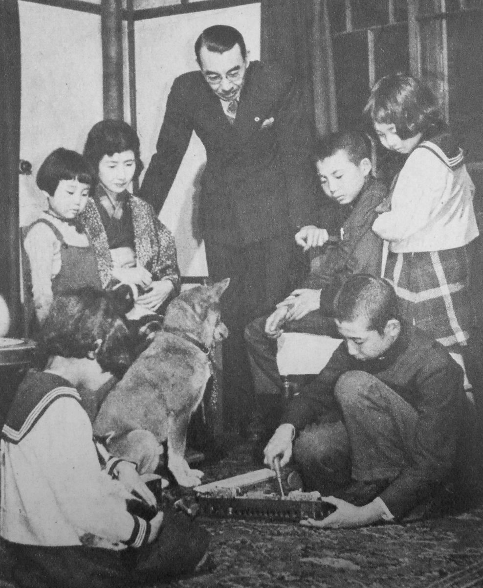 島津忠承